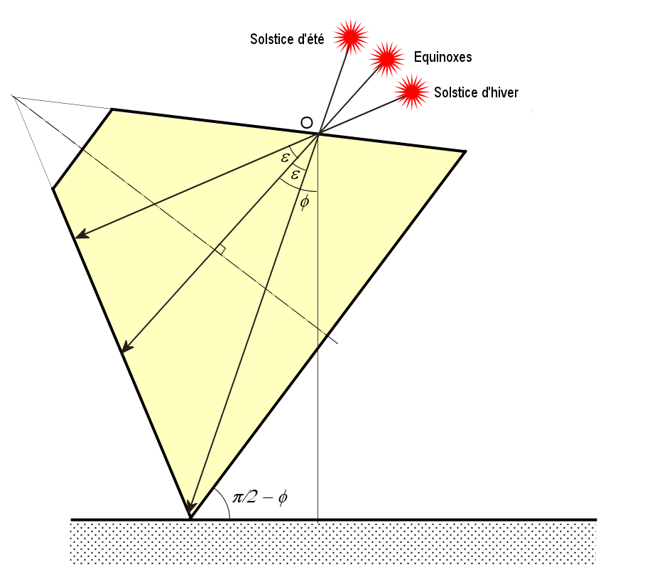 Schéma de cadran conique à œilleton.